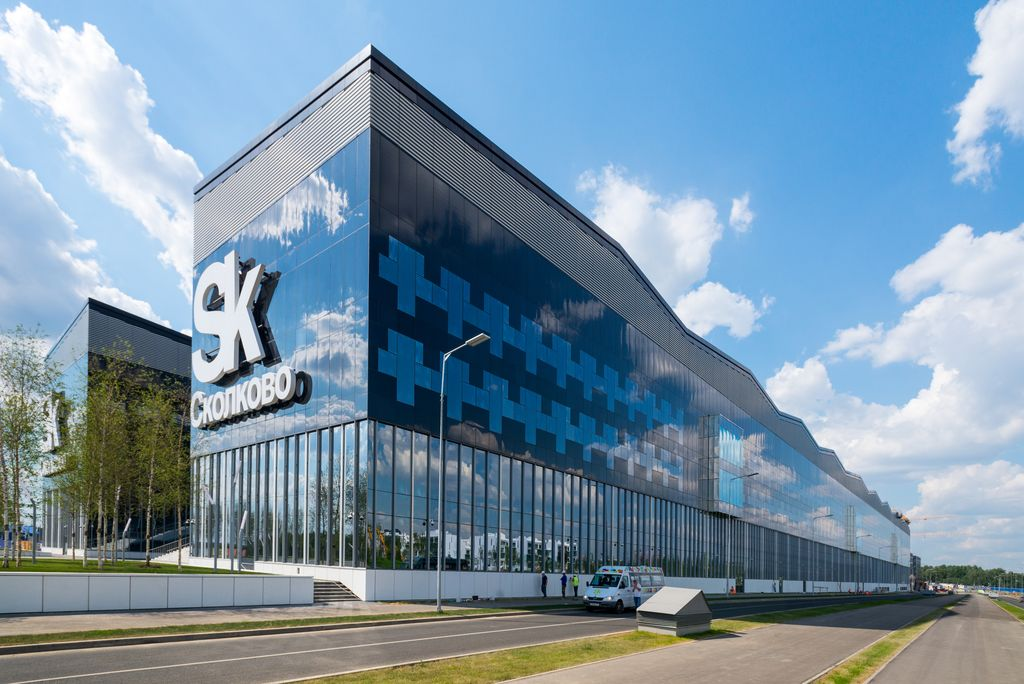 Технопарк "Сколково", Инновационный центр "Сколково"